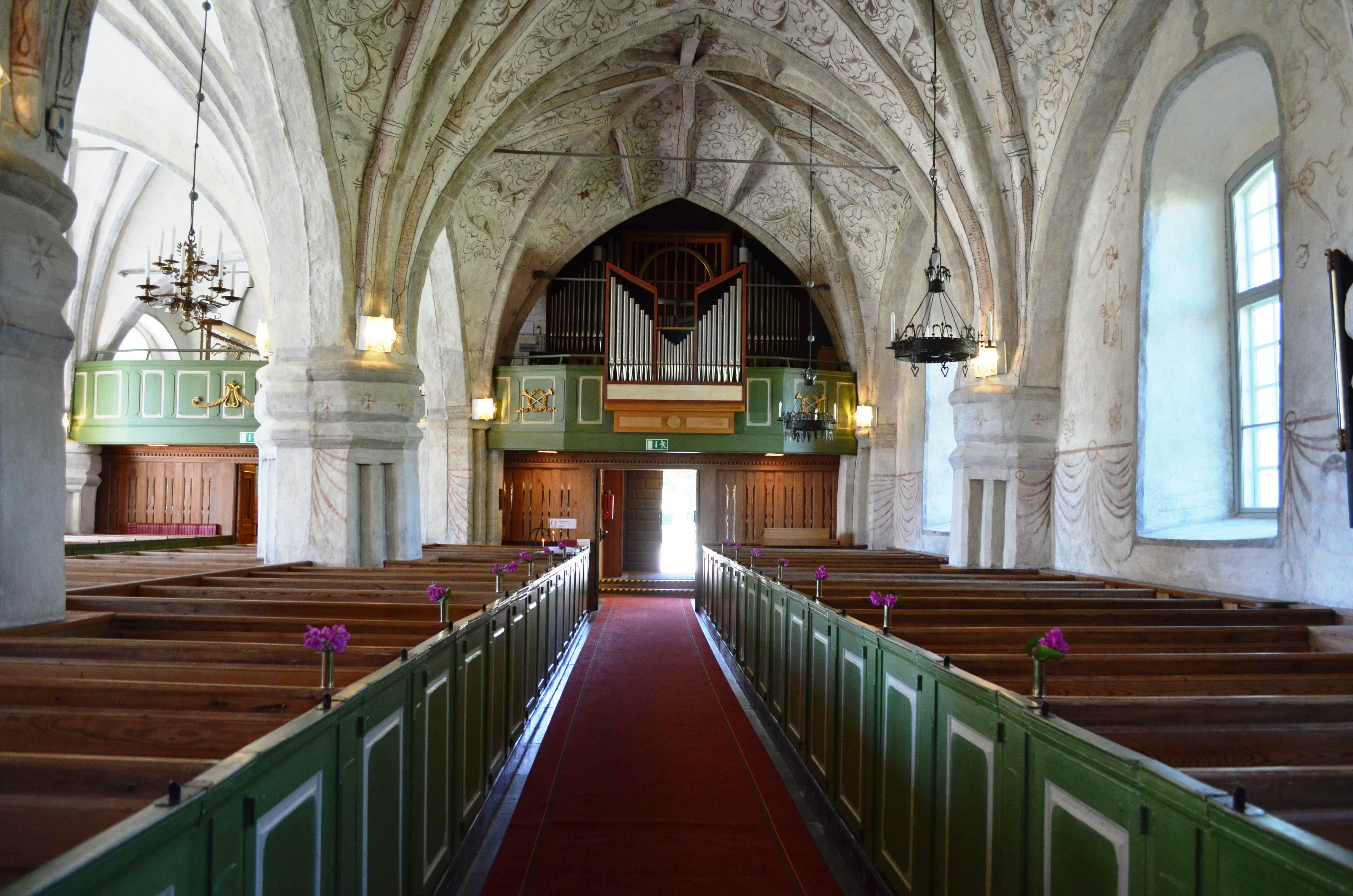 Ogellåktaren